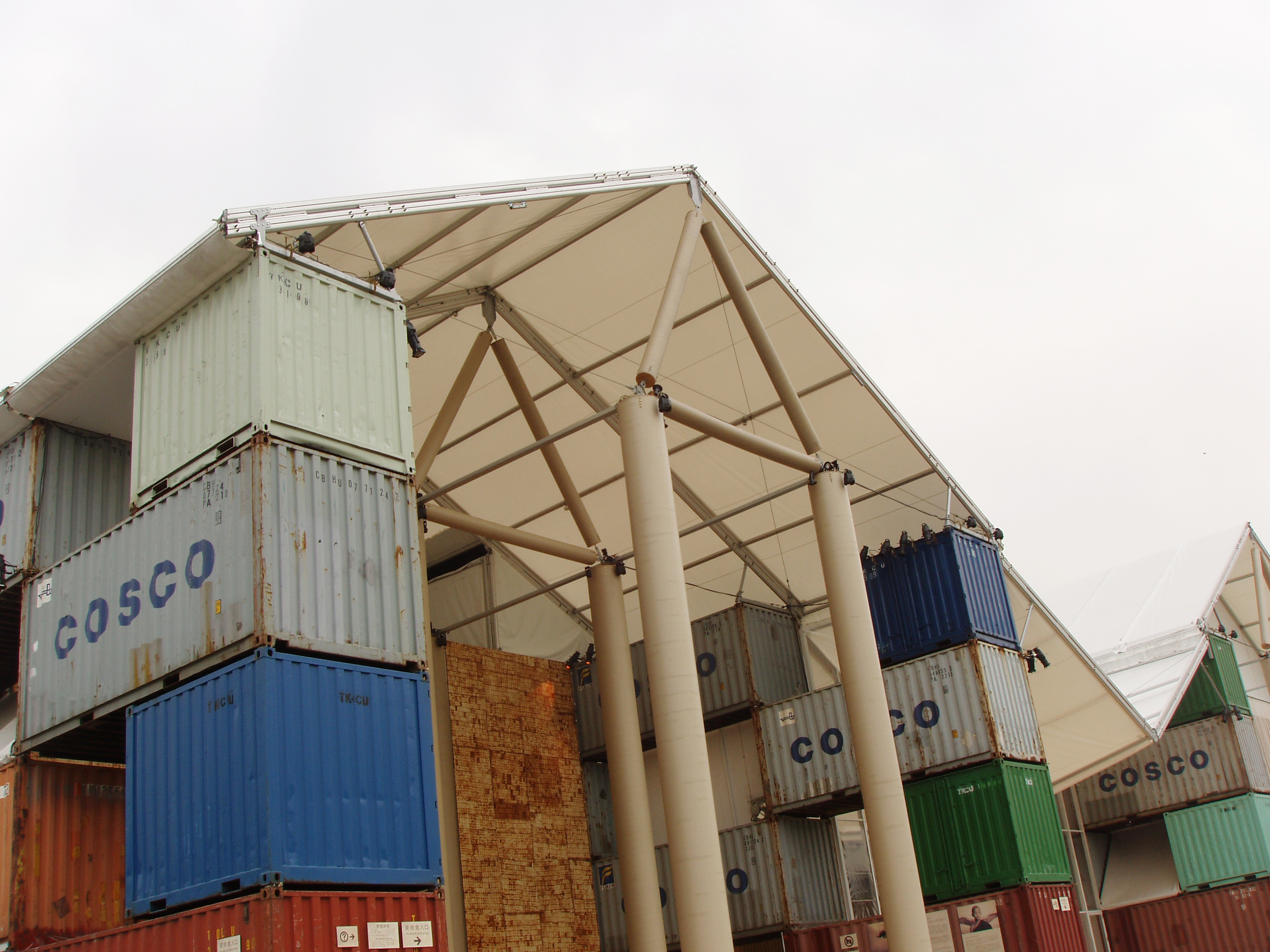 Nomadic Museum 02